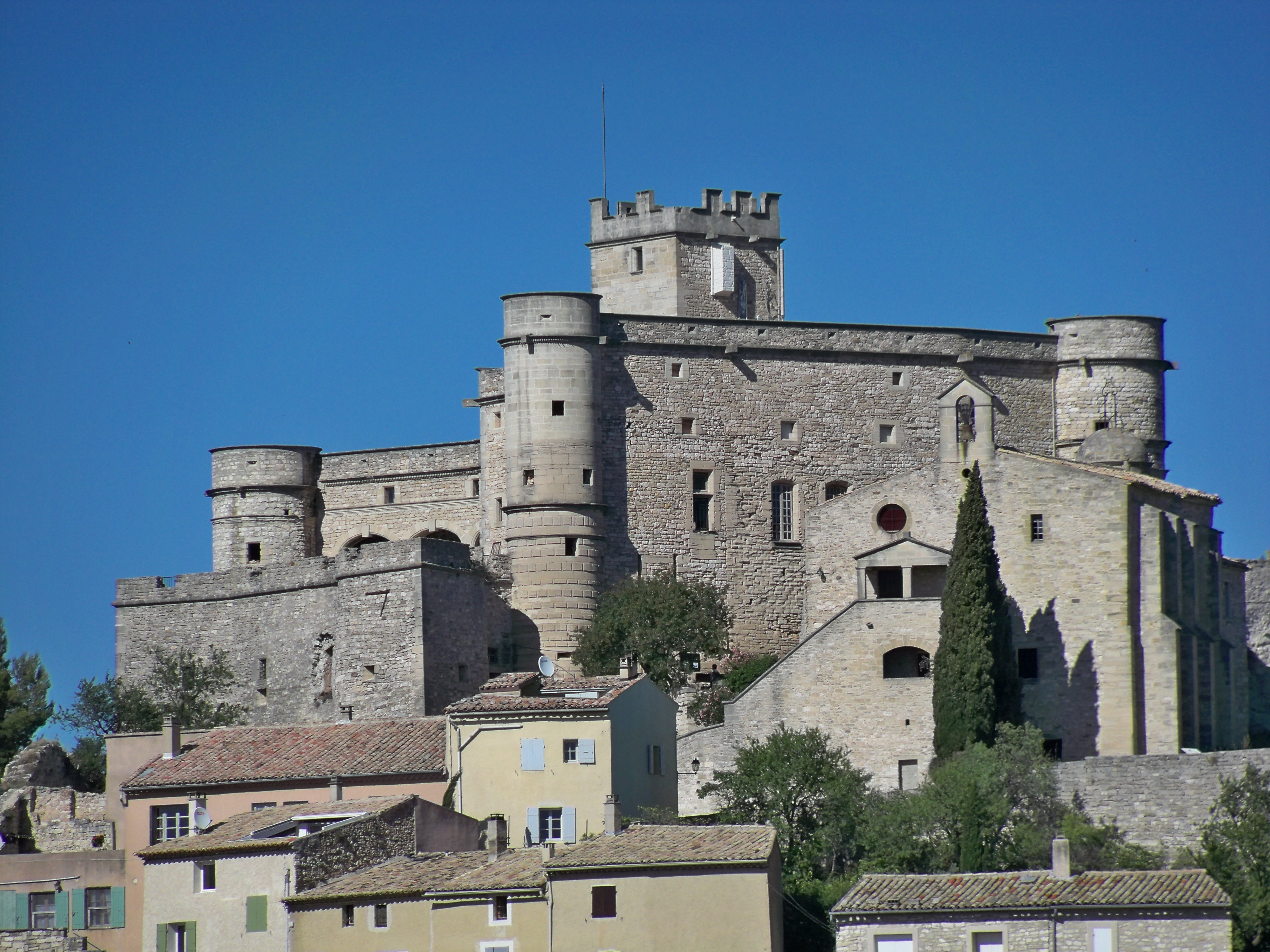 Vue sur le Chateau du Barroux (84) .